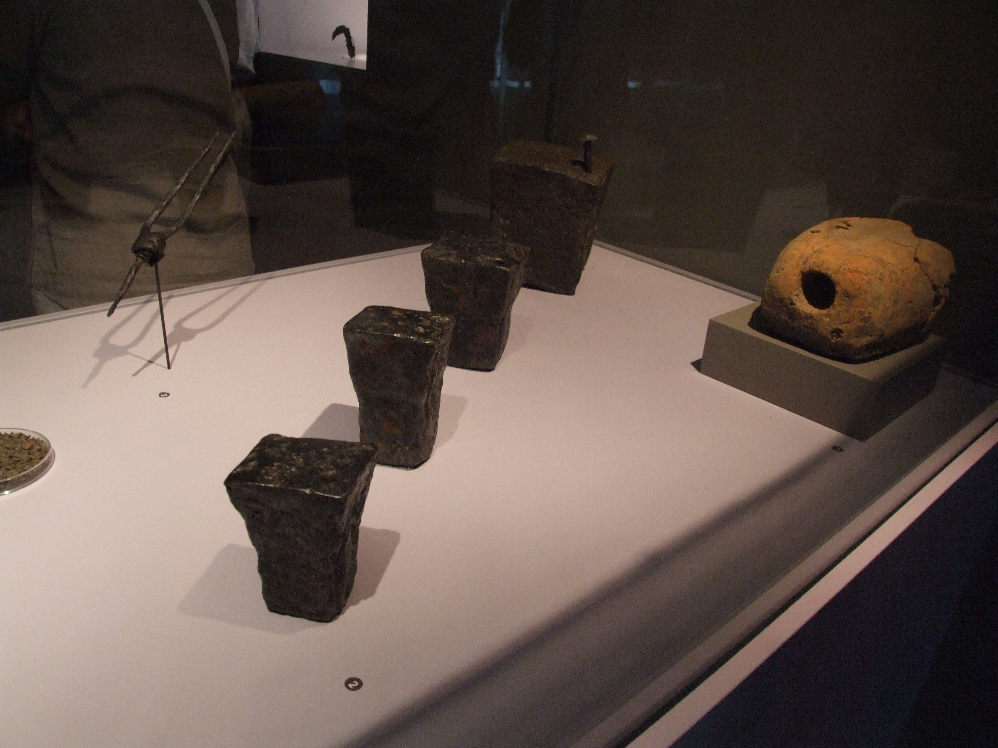 Vier römische Ambosse aus Eisen zum Schmieden von Nägeln und Metallstiften. An einer Ecke weisen sie jeweils eine Vertiefung auf, die sich als Schlitz fortsetzt. Leihgabe Römermuseum Schwarzenacker (Homburg) für die Pompeji-Ausstellung Europäischer Kulturpark Bliesbruck, en: Four roman anvils for forging nails; Römermuseum Schwarzenacker; fr: Quattre enclume romain, pour forger des clous our d'autres tiges metalliques.